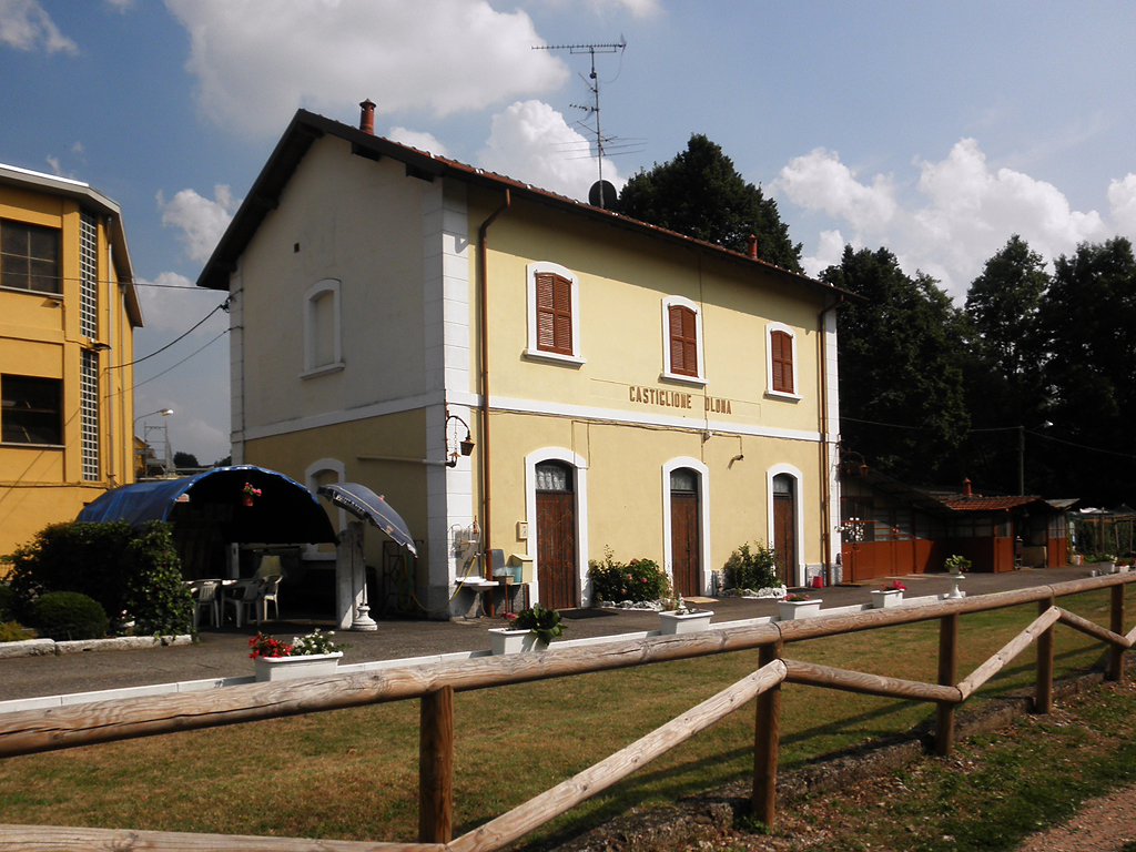 L'area del piazzale binari dell'ex stazione ferroviaria di Castiglione Olona.